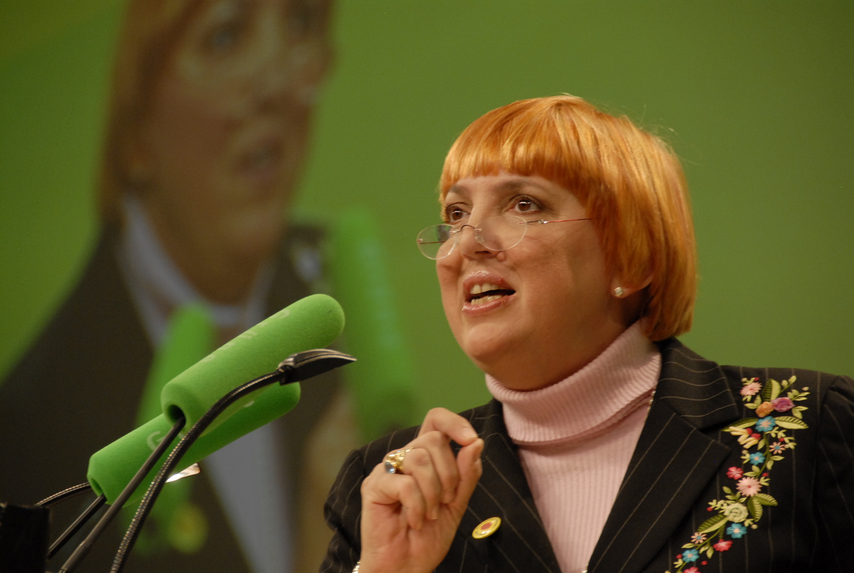 Claudia Roth